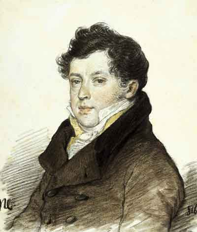 П.Ф.Соколов. Портрет А.И.Тургенева. 1816. Бумага, итал. карандаш, пастель, сангина, тушь, перо. Собрание В.В.Царенкова (Париж) Александр Иванович Тургенев (1785–1846)